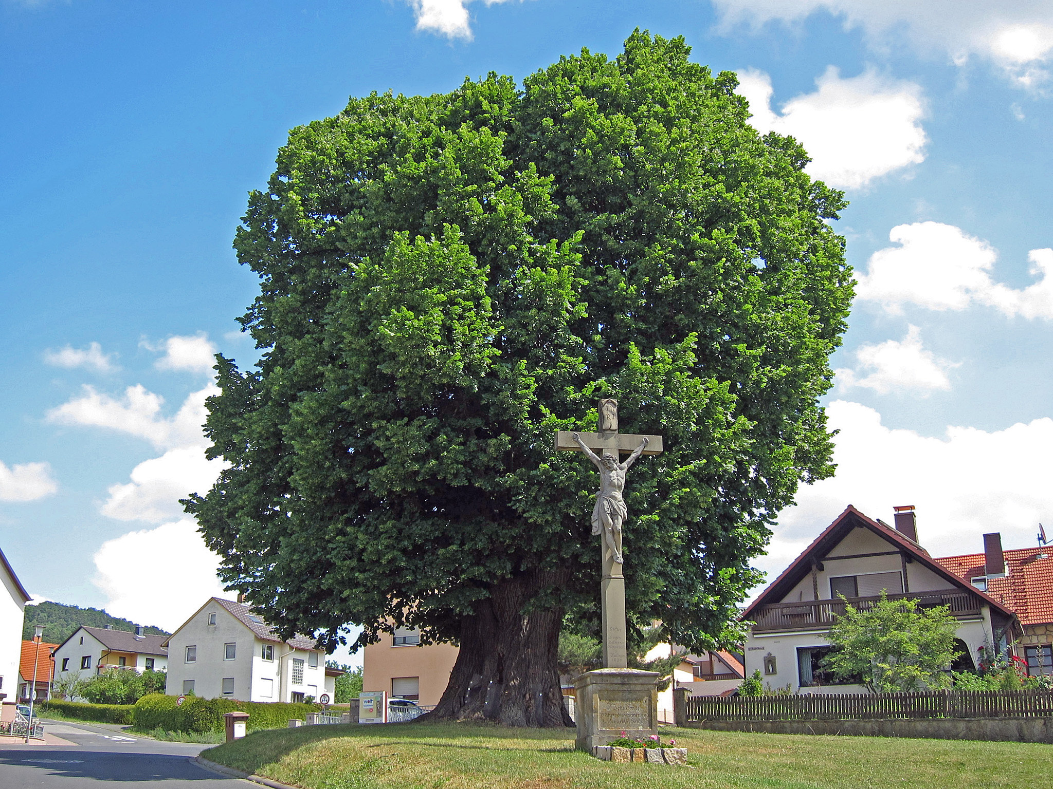 Linde in Nüdlingen